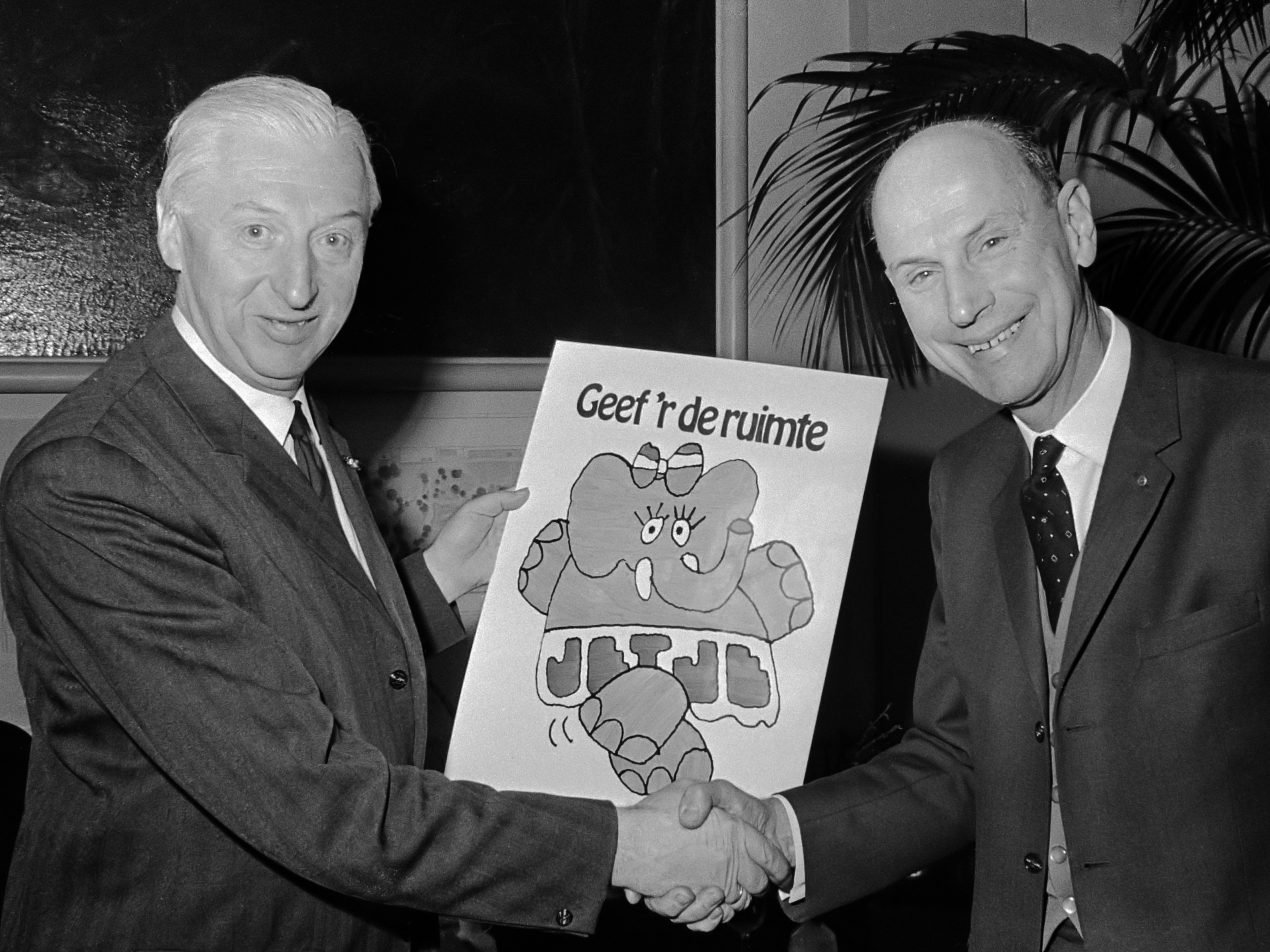 Donatie van het Comité "Prins Bernhard 60 jaar" voor een nieuw olifantenhuis in Artis. Aanbieding van het afficheontwerp door mr. H.W. Bloemers (l), voorzitter van het comité en commissaris van de koningin van Gelderland, aan E.F. Jacobi, directeur van Artis